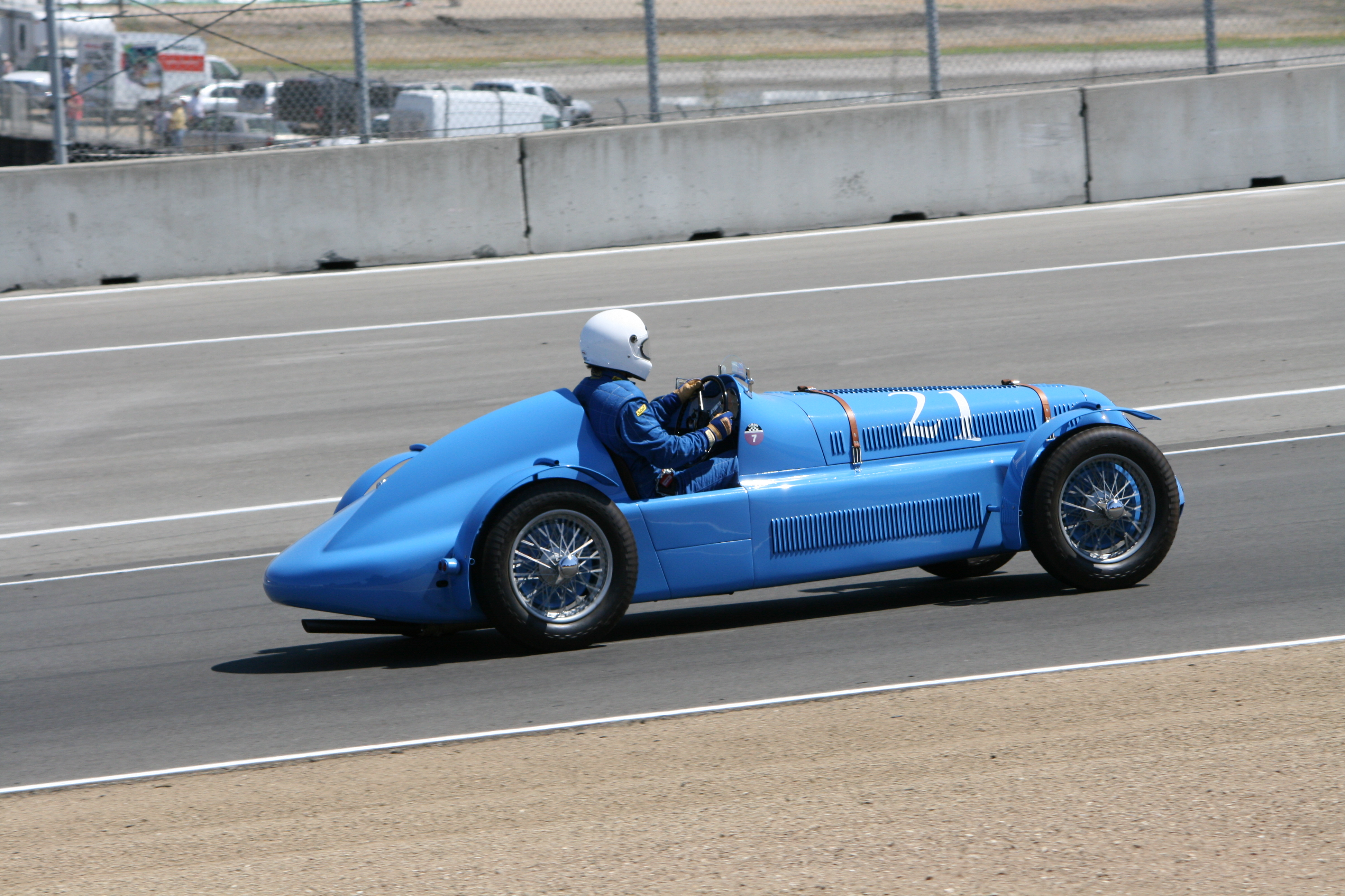 1946 Delage D6 at Monterey